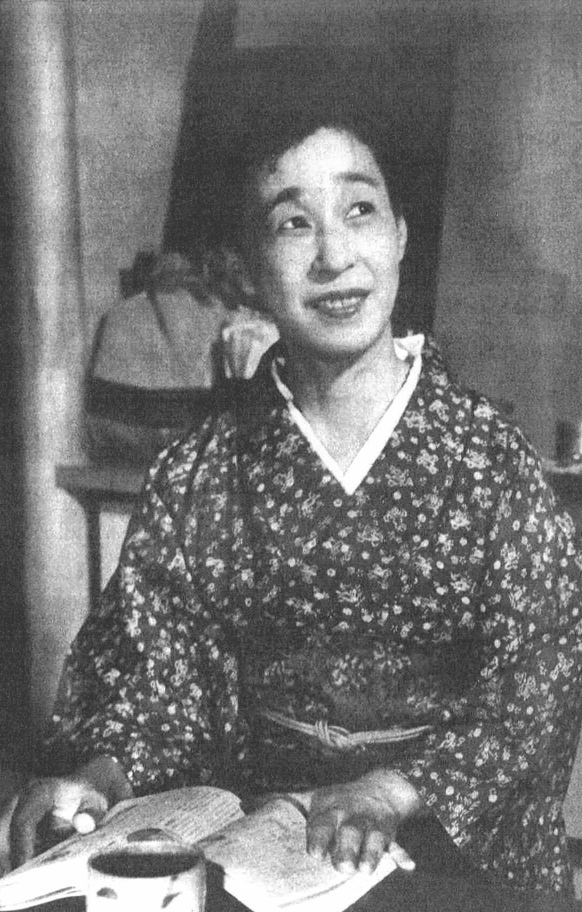 読売新聞社『家庭よみうり』398号（1954年）より美川きよ